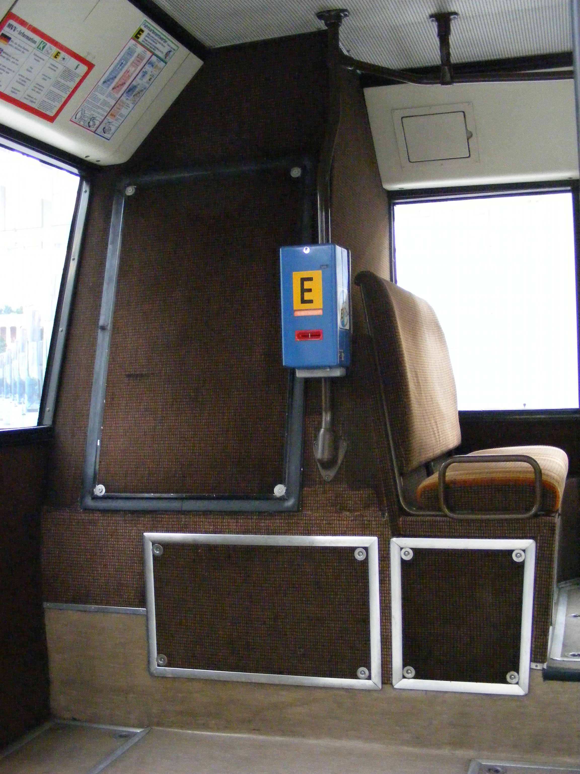 Neoplan-Niederflur-Bus, Bj. 1986, Wagen 5410 (5 Jahre vor der Großserie). Hier die Ansicht des Motorkastens im Fahrgastraum (Deutz V 8 Dieselmotor, stehend) von der drittletzten Türe aus. Die Stadtwerke München verwendeten das Modell von 1986 bis 1995 (zuerst auf der Linie 52 und anschl. auf der Linie 33). — Exponat im MVG Museum.